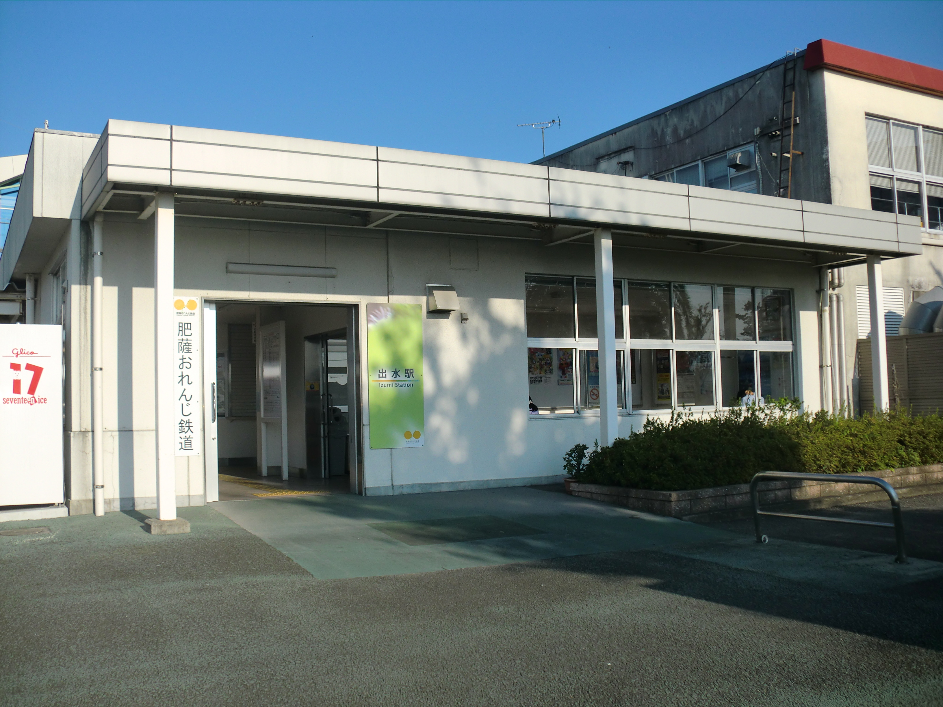 肥薩おれんじ鉄道出水（いずみ）駅